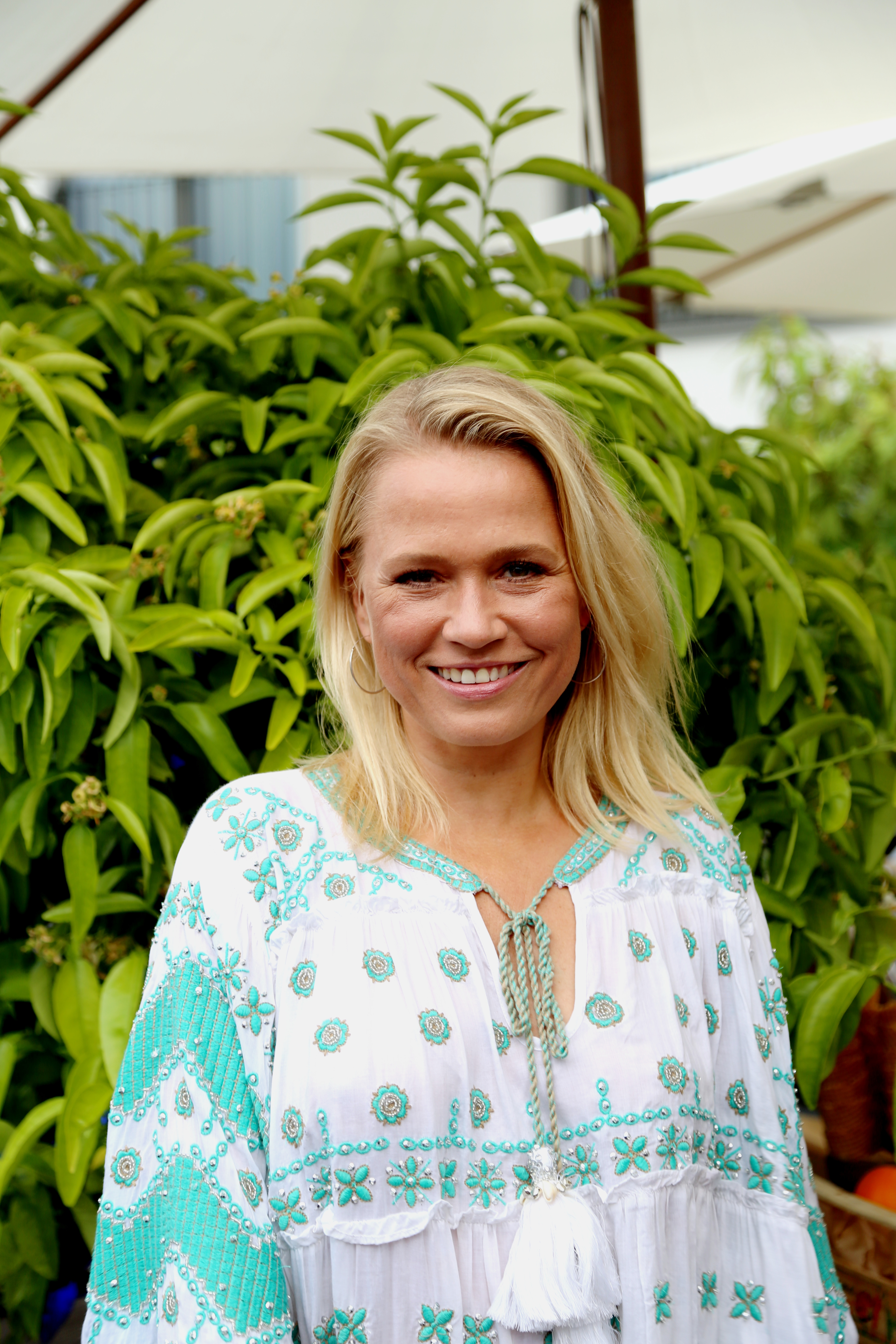 Nova Meierhenrich bei der Aspria-Sommerparty 2017 am 17. Juni in Hamburg.